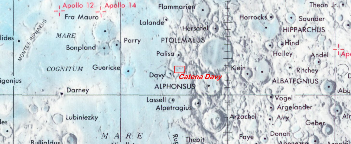 Catena Davy . Localización. (Lunar Chart LPC1. Second Edition)